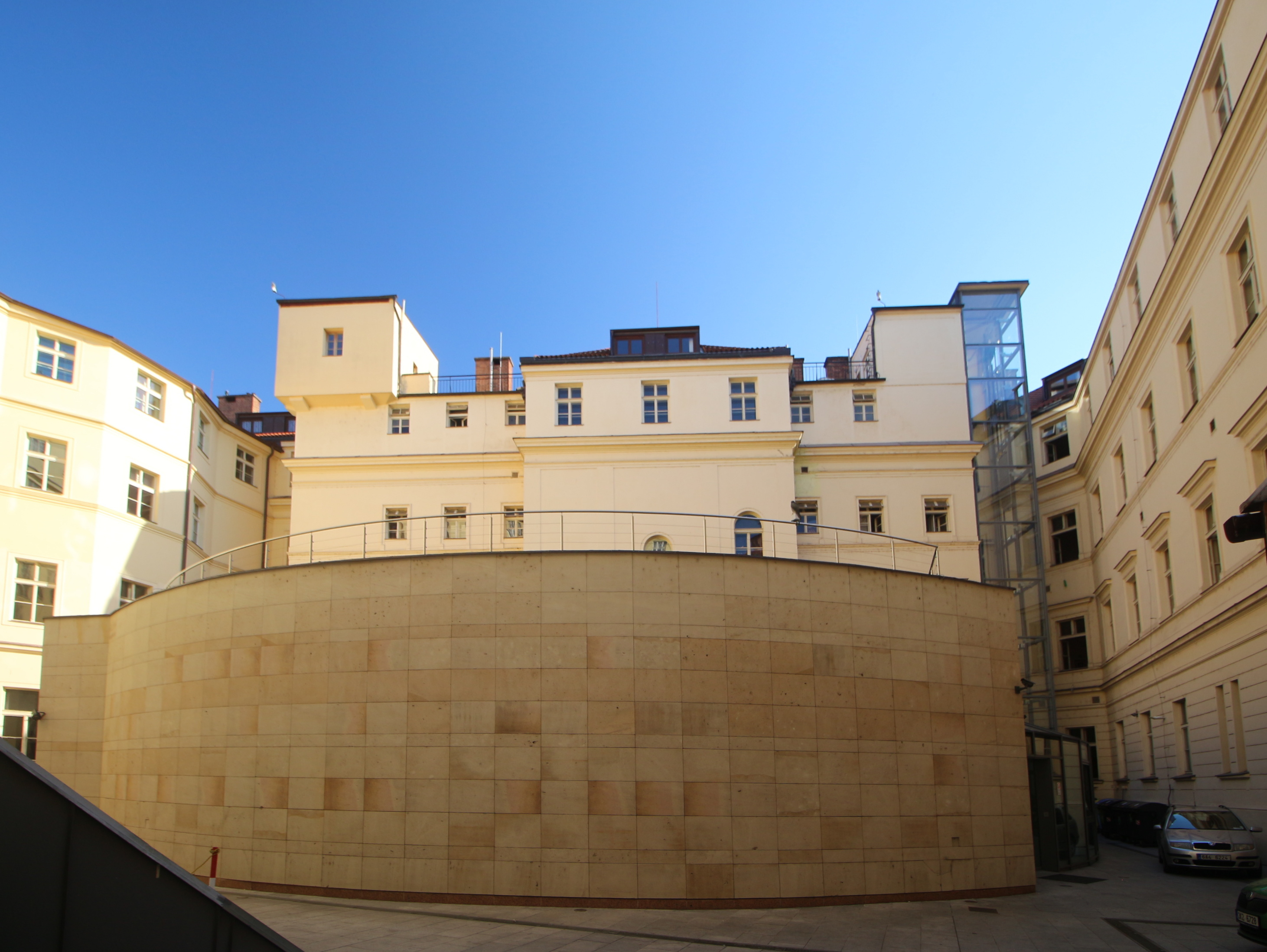 Divadlo Na rejdišti, Praha, Dvořákovo nábřeží